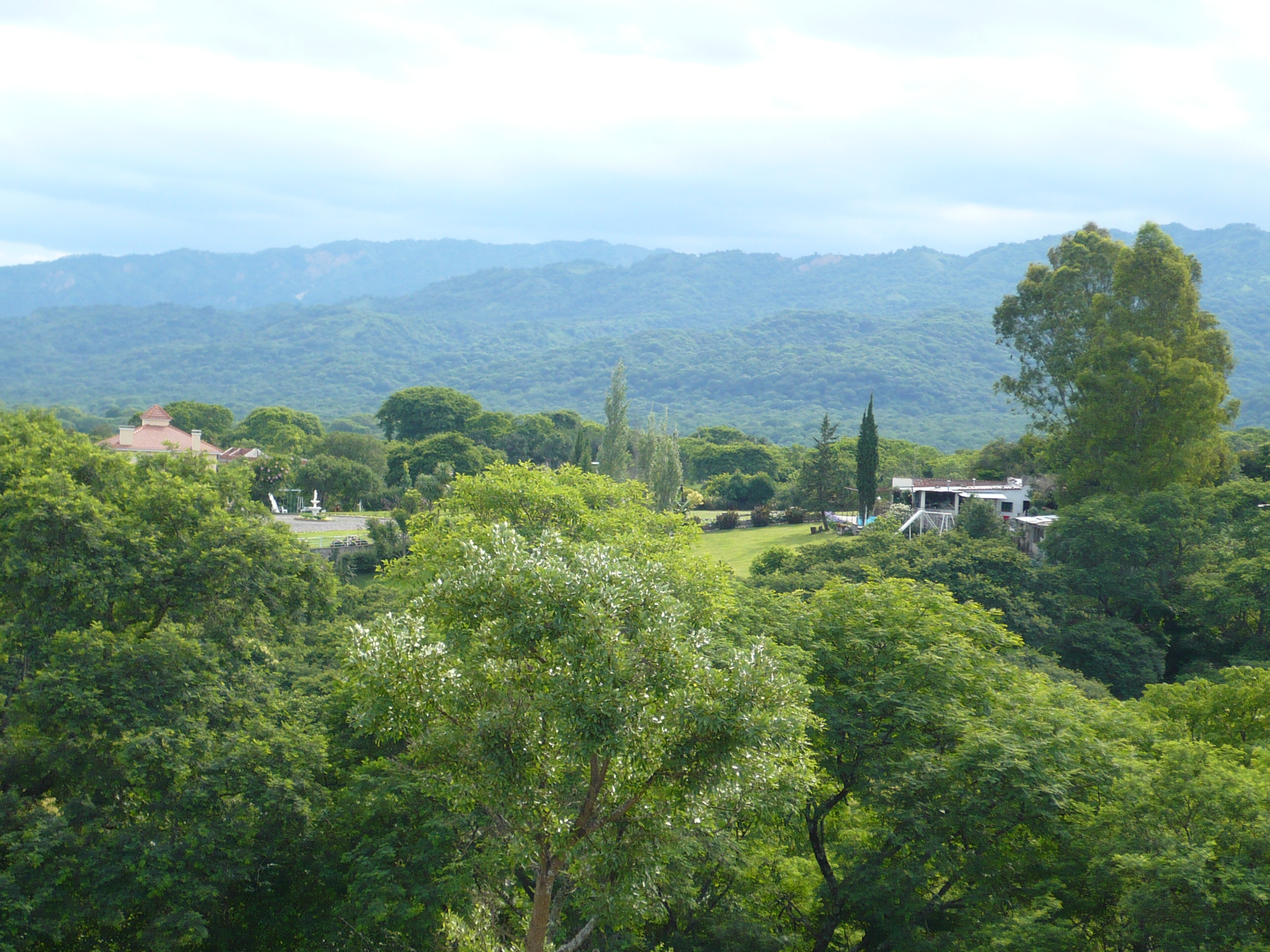 Otra vista desde el cristo de La Caldera (Salta, Argentina)